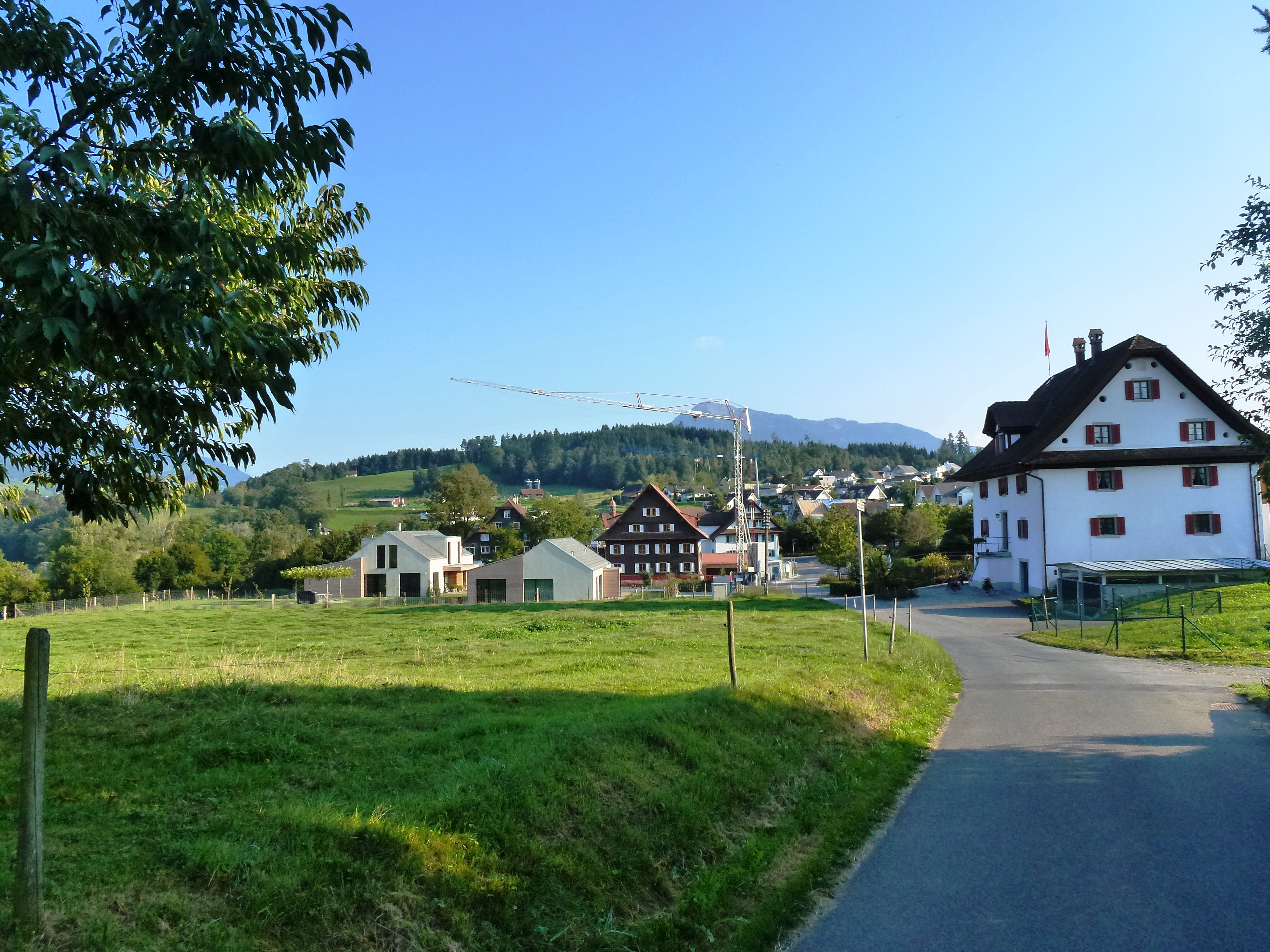 Das Dorf Buonas